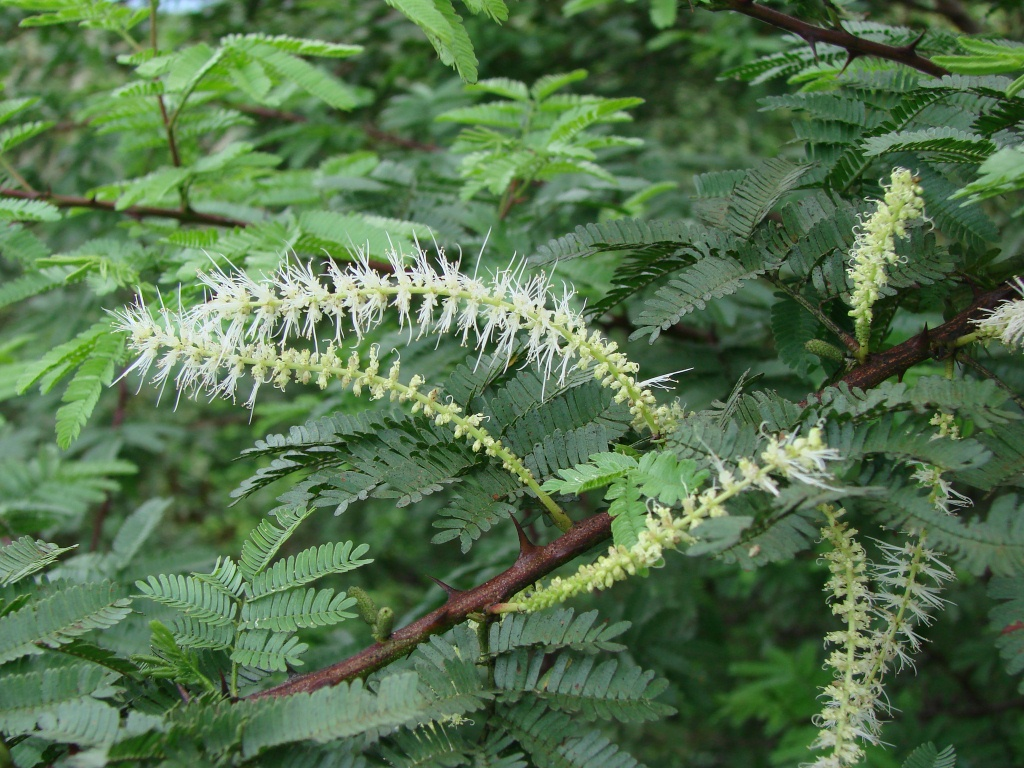 Mimosa tenuiflora (Wild.) Poir. - FABACEAE - BR 242 - Cristópolis - Bahia - Brasil.